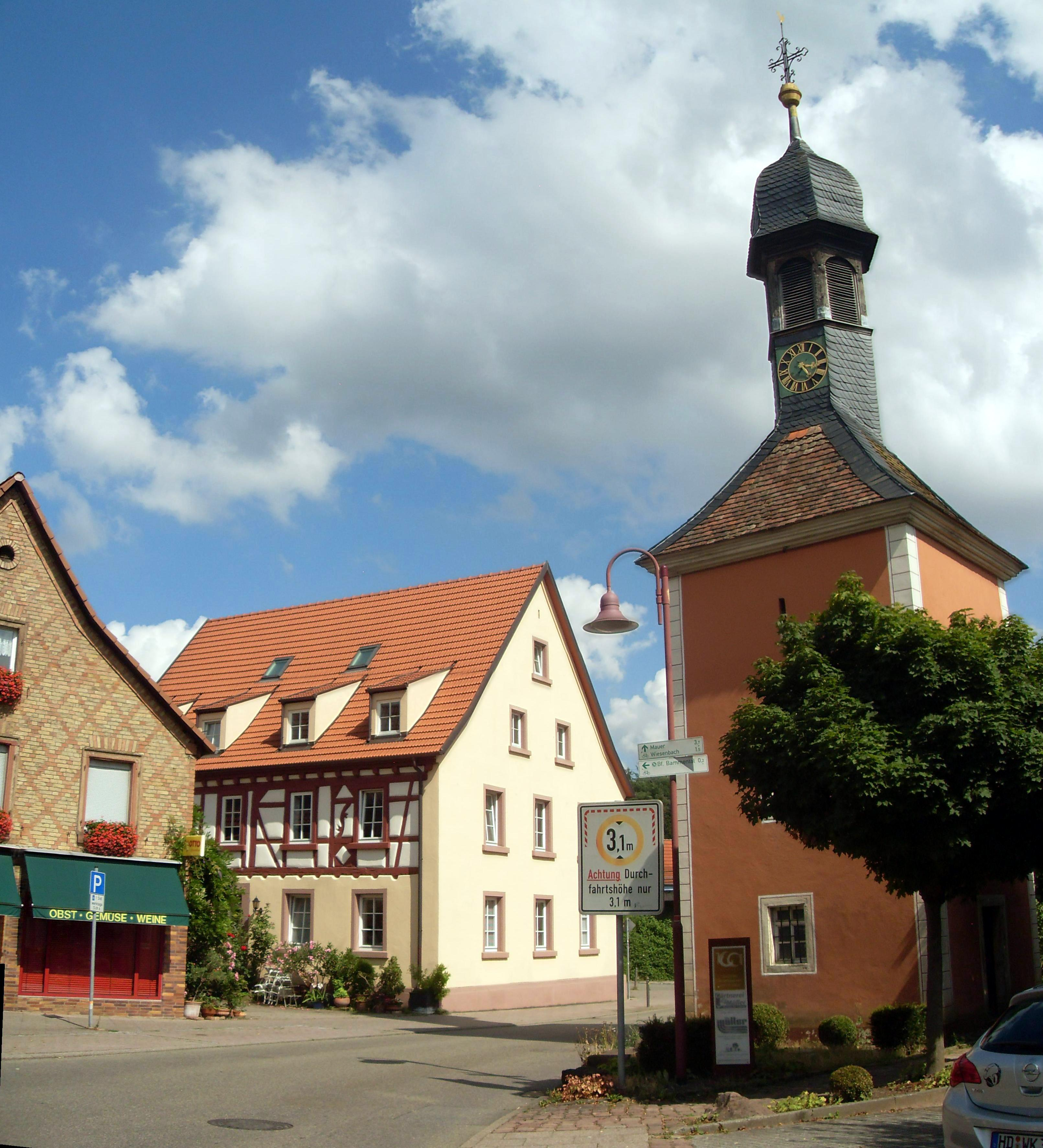 Wachturm in Bammental